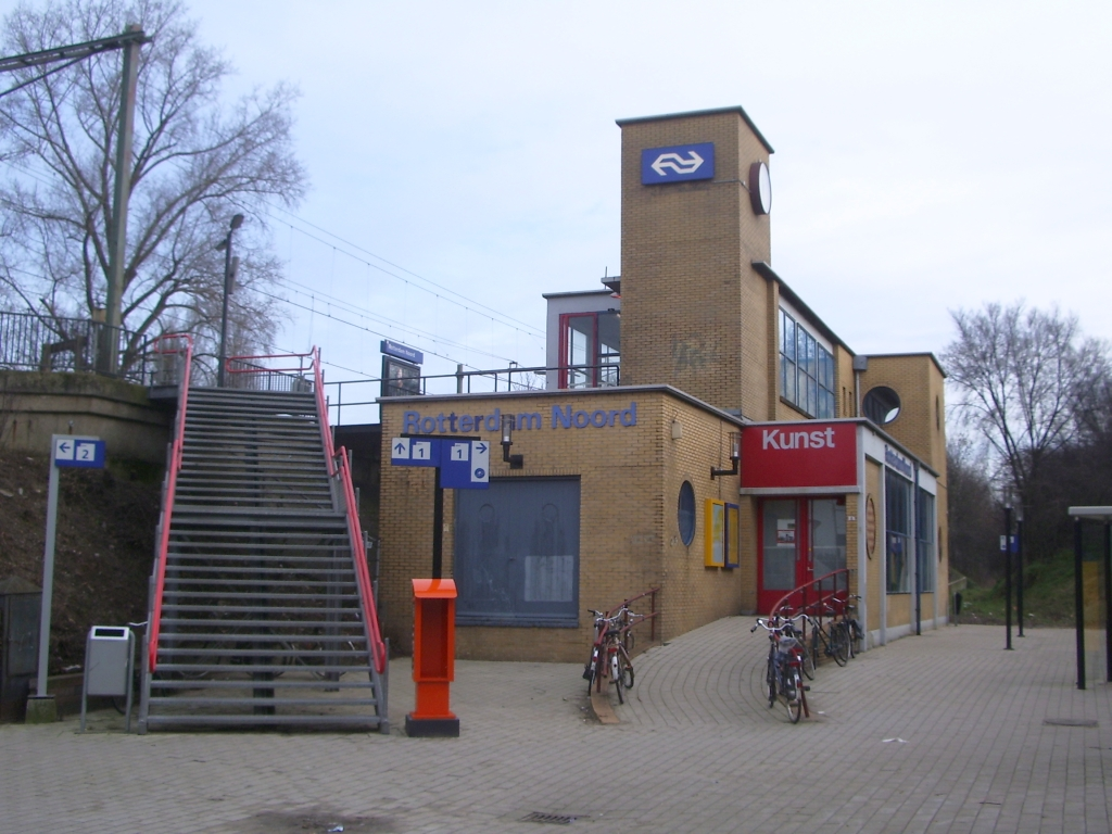 Station Rotterdam Noord, stationsgebouw. Eigen werk, februari 2007 Rotterdam Noord railway station. Own work, february 2007